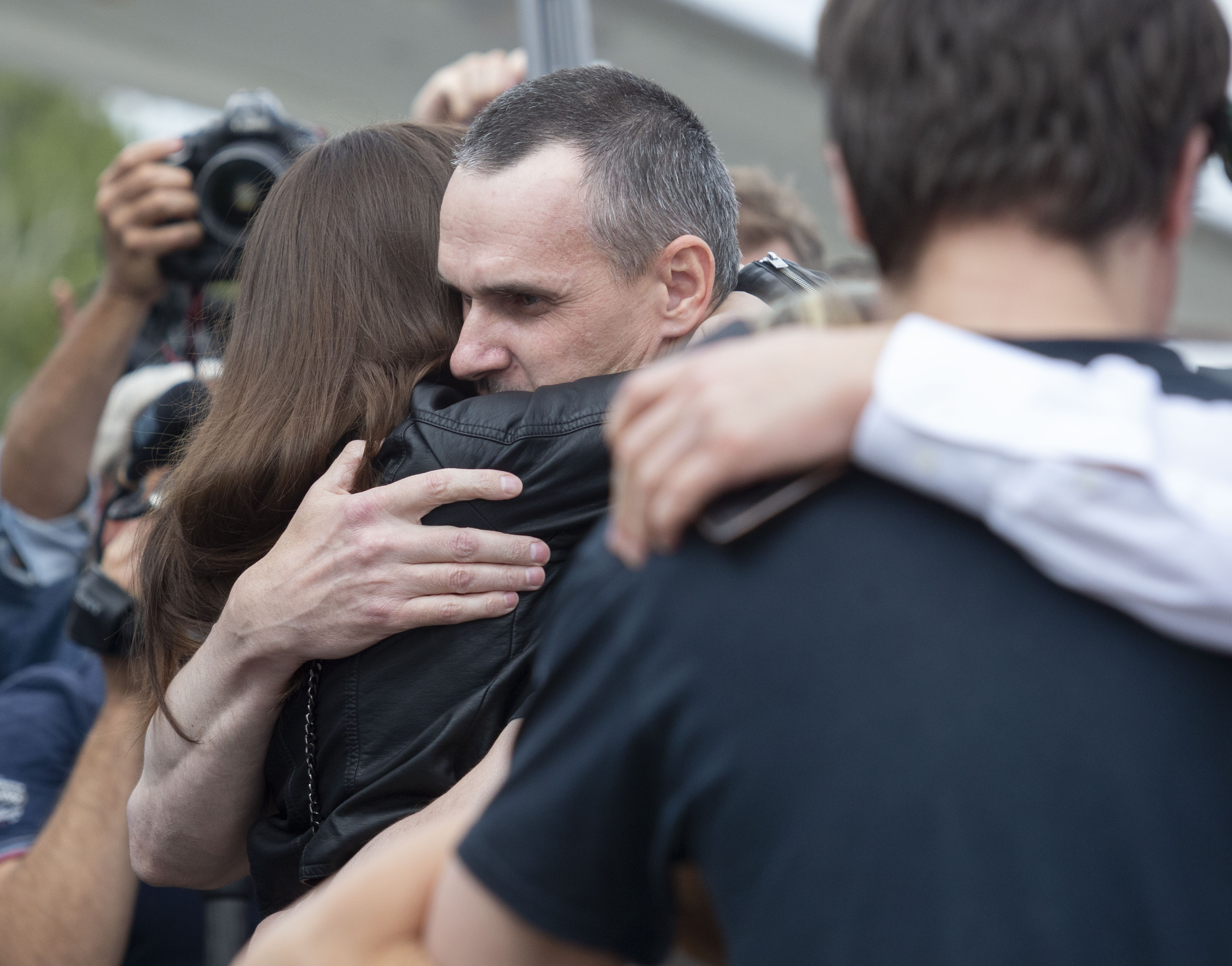 Oleh Sentsov return